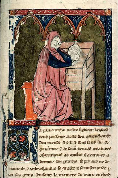 BML-Ms948-fol94 - Sidrac lisant